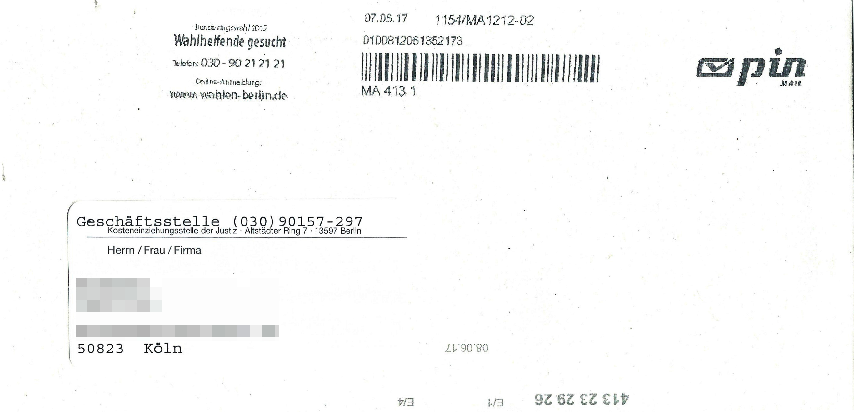 Briefumschlag mit Frankiervermerk und Transport durch pin Mail, innerdeutsch von Berlin nach Köln